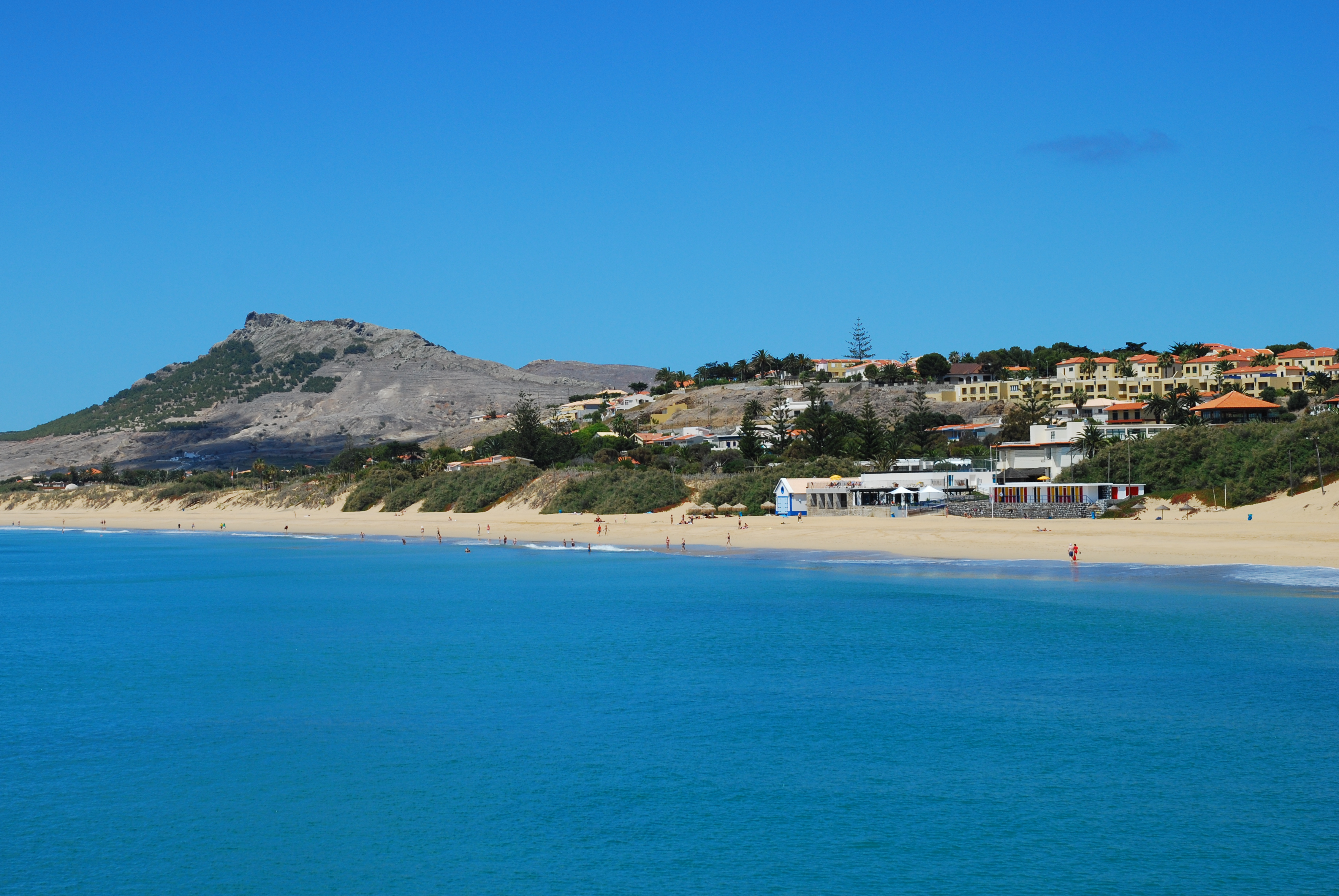 Madeira-01-0018